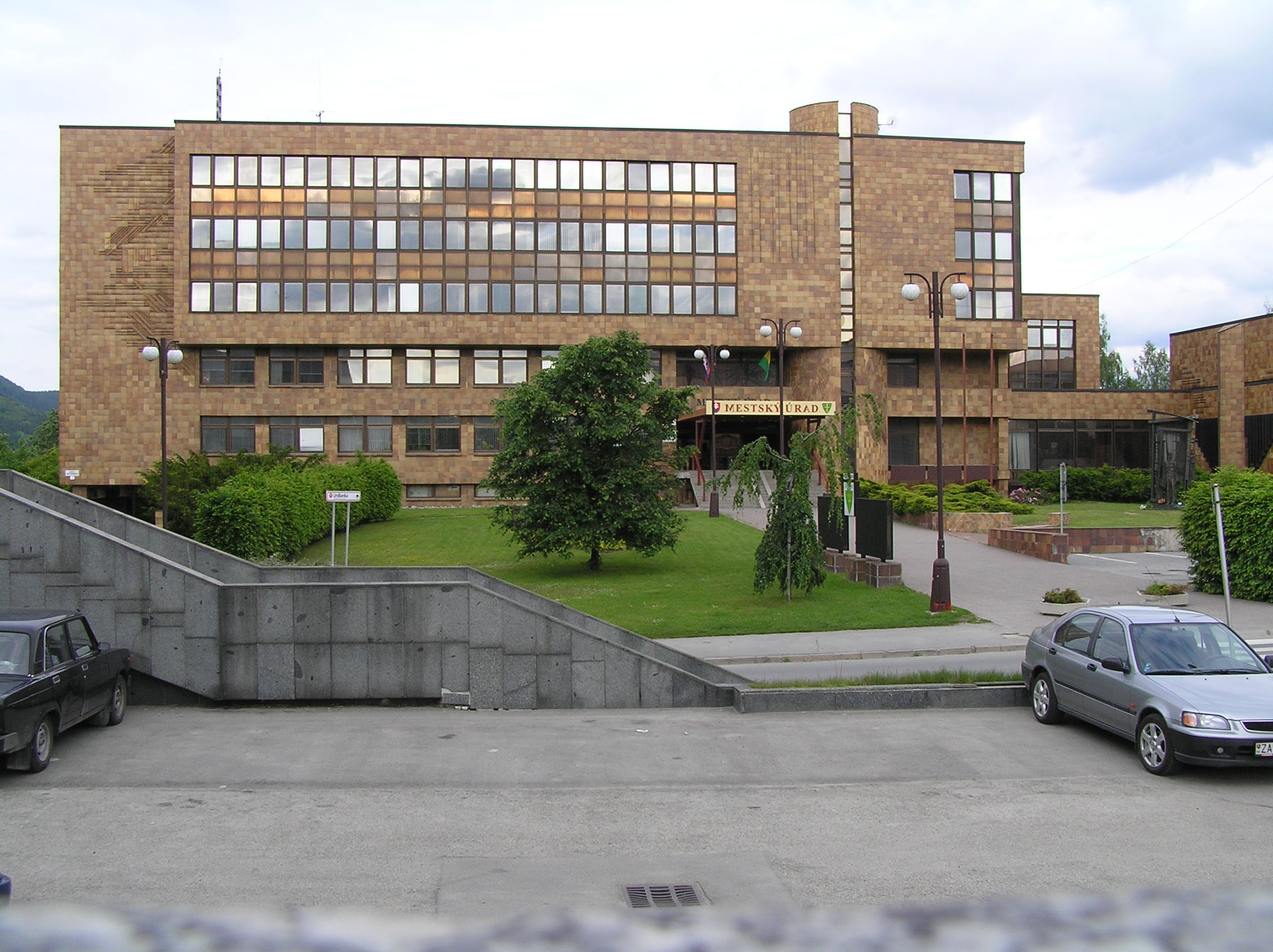 Žilina, Mestský úrad